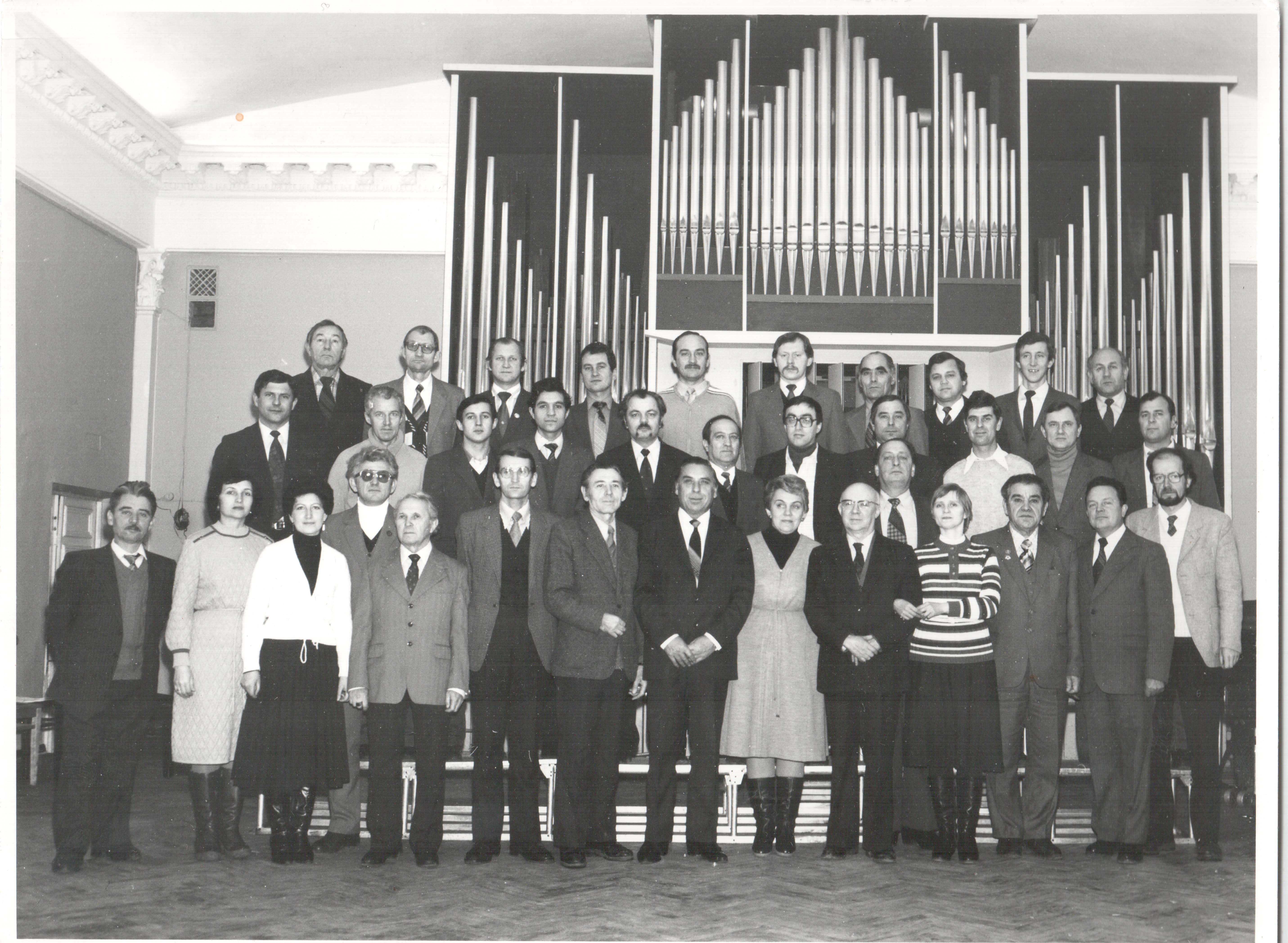 Факультет повышения квалификации Киевской консерватории. Группа духовиков, выпуск 1984 года.